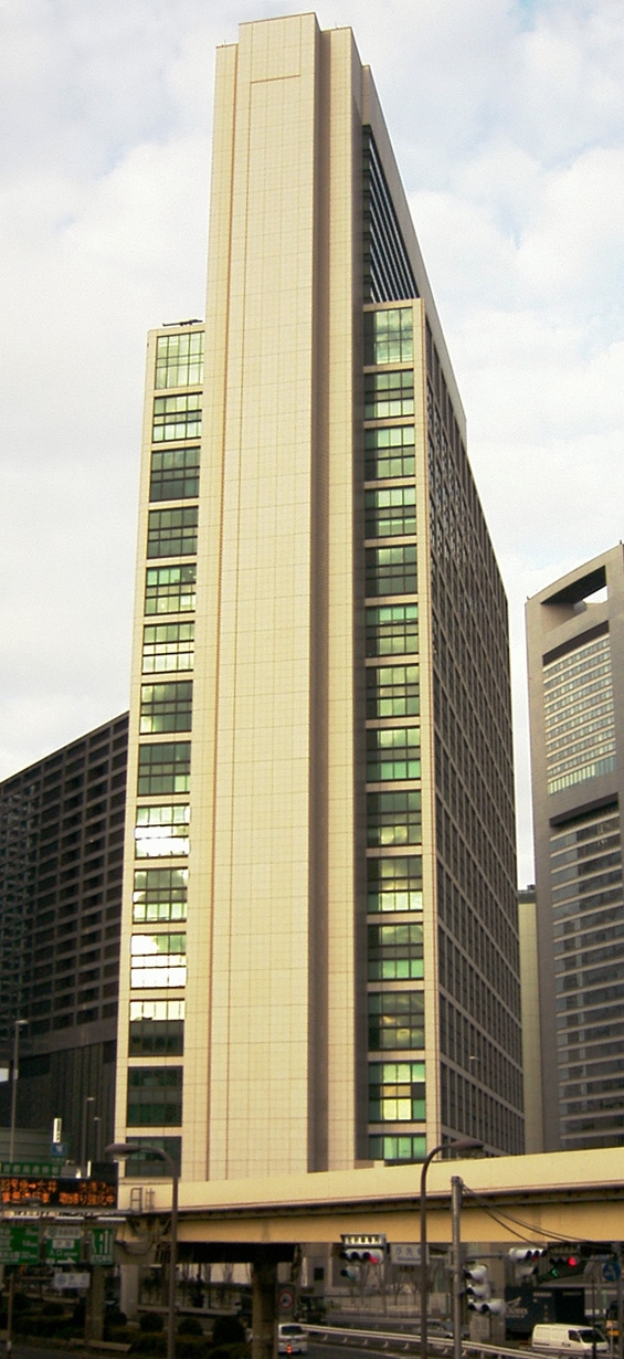 Tokyo_Shiodome_Building Tokyo Japan